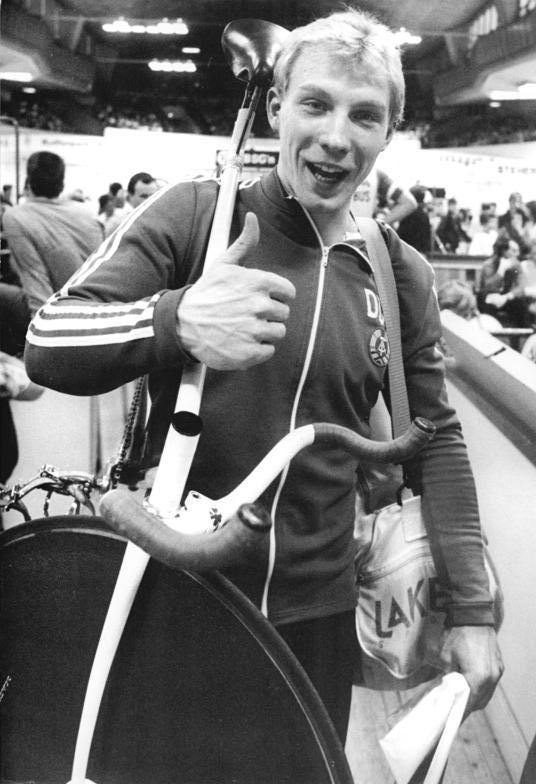 Jens Glücklich ADN-ZB Mittelstädt 14.1.89 Berlin: XIV. DDR-Hallen-Meisterschaften - Das 1000-Meter-Zeitfahren gewann in der Werner-Seelenbinder-Halle Jens Glücklich (SC Cottbus) in der Zeit von 1.06.75 min.